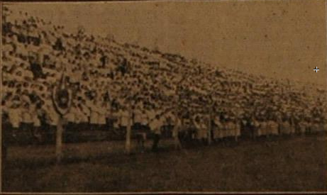 tribuna oeste del estadio de Unión de Santa Fe 1945